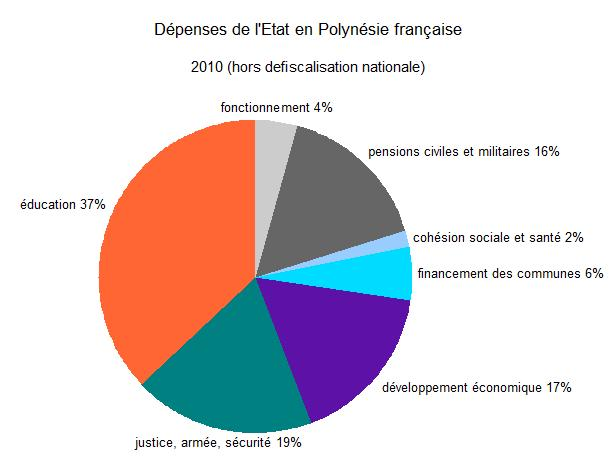 Catégories de dépenses de l'état